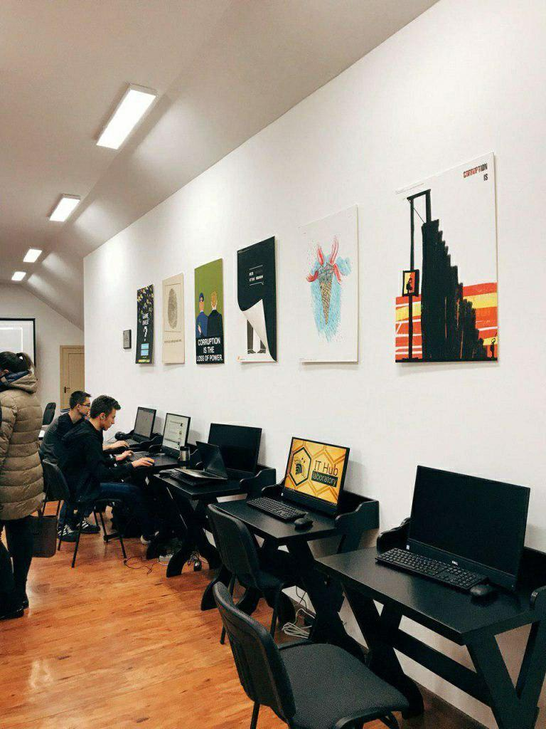 IT-Cluster Острозької академії